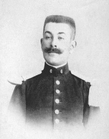 Augustin De Langlais, agente leggittimista alleato di Carmine Crocco